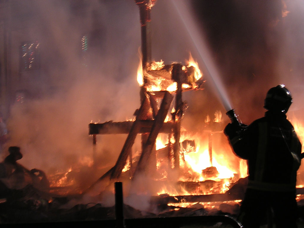 Bombero apagando una falla